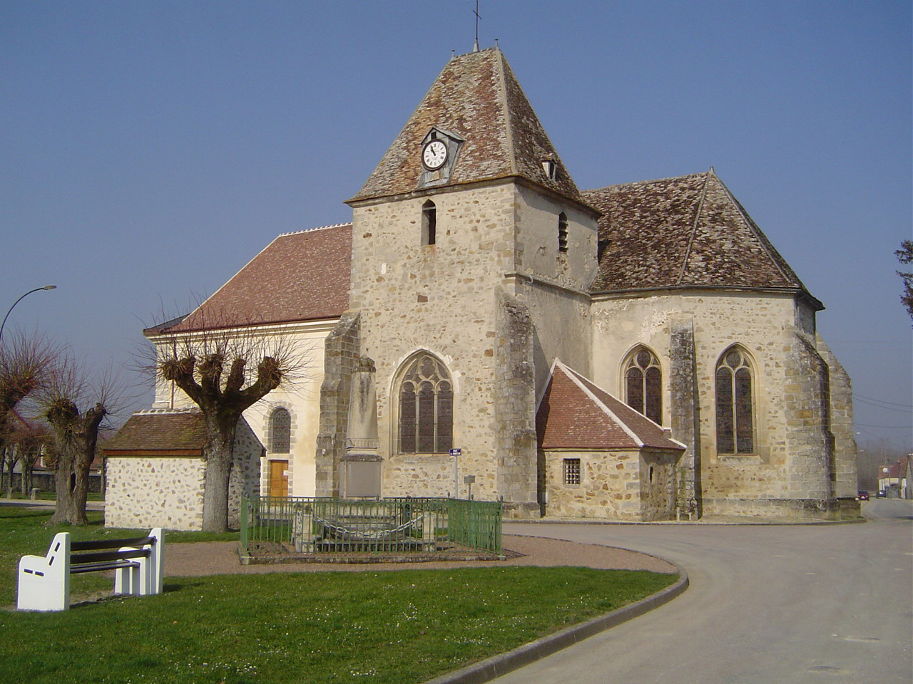 La Motte-Tilly - Le château